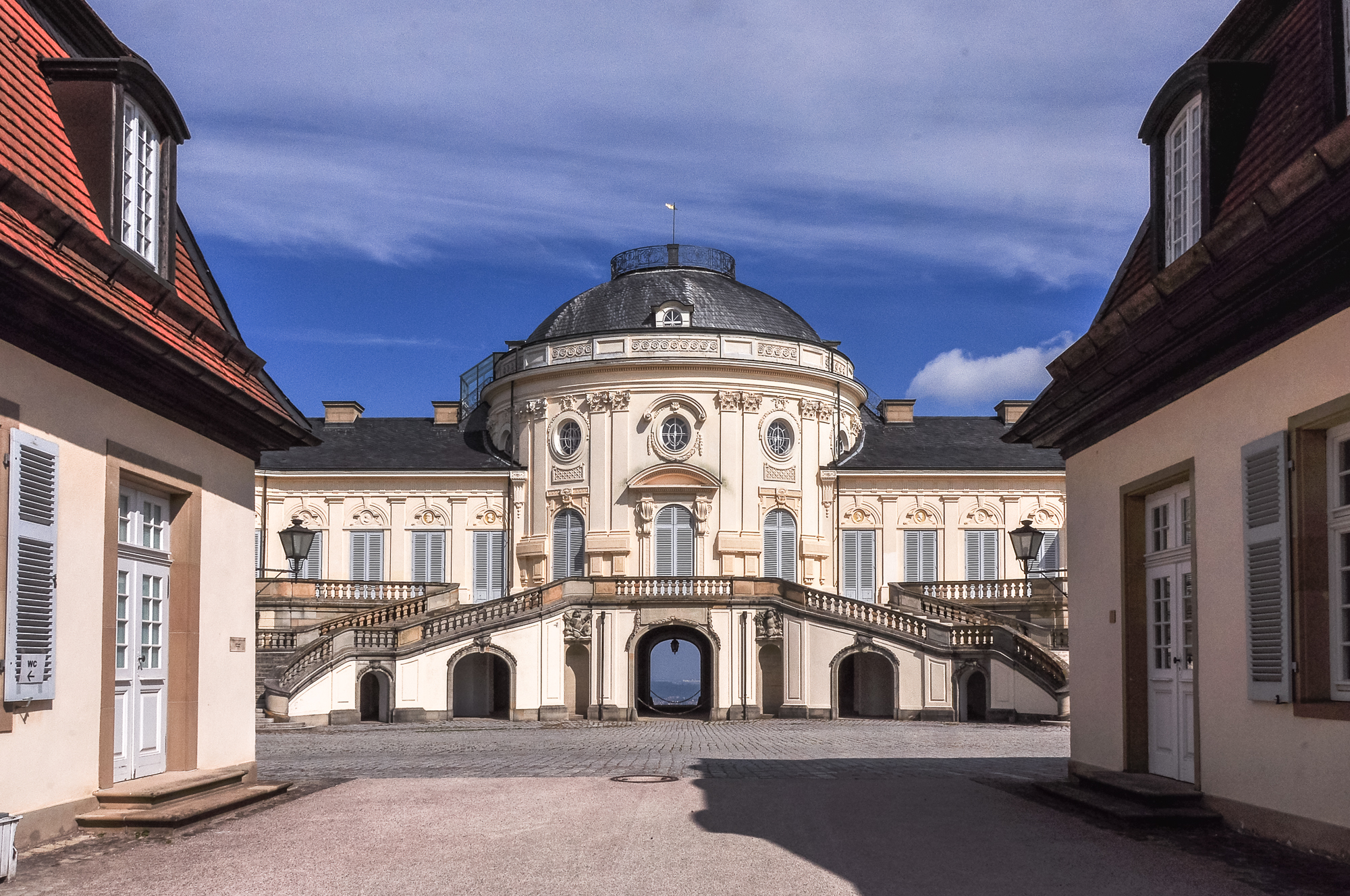 Dies war der Durchgang vom Schloss Solitude, zwischen den Kavaliershäuschen, hier links und rechts im Bild, hindurch in die umfangreiche barocke Gartenanlage.